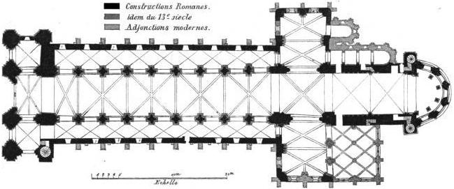 Plan de l'église abbatiale de la Trinité de l'abbaye aux Dames de Caen en 1863